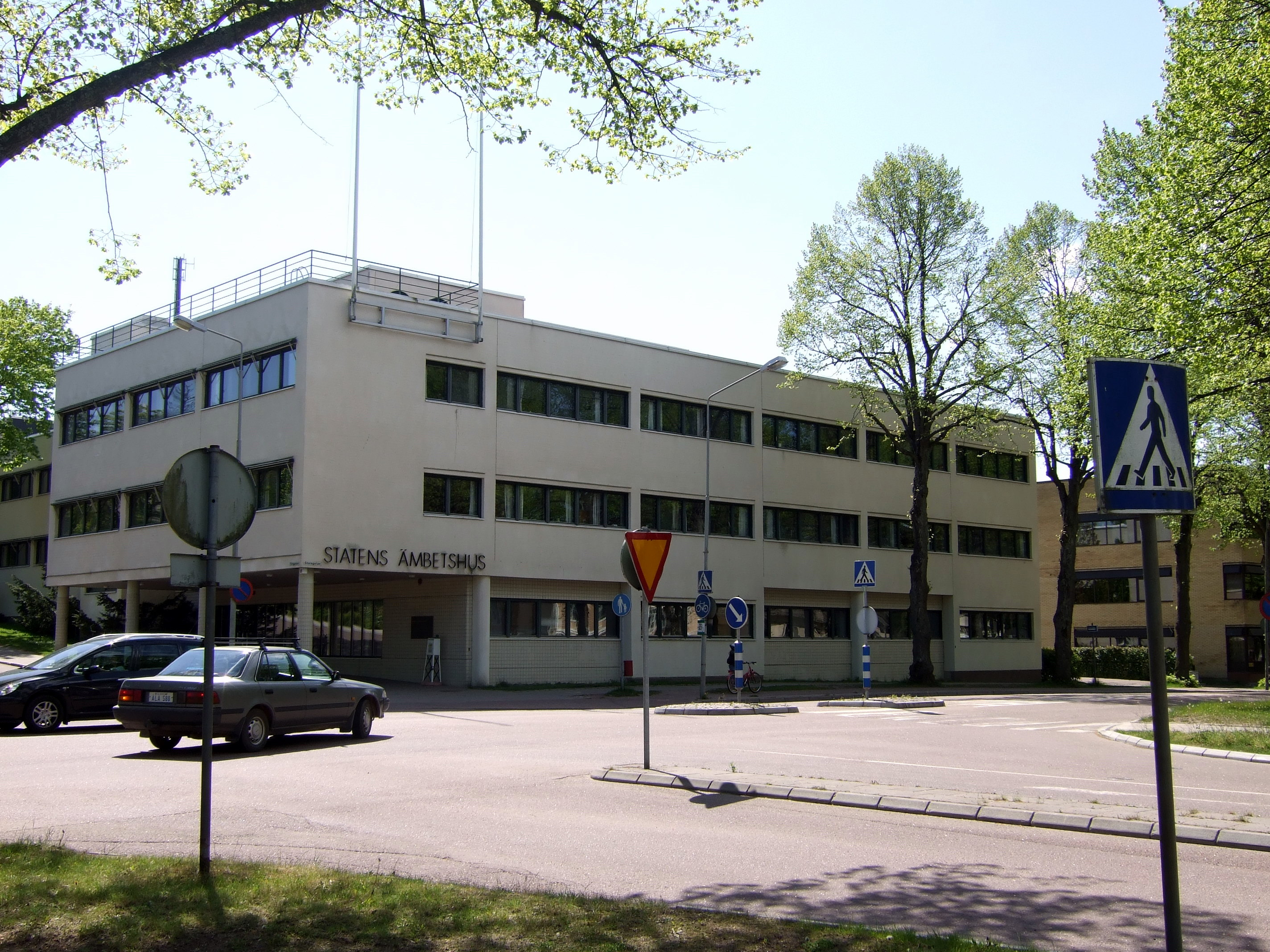 Statens ämbethus, Mariehamn, Åland, Finland